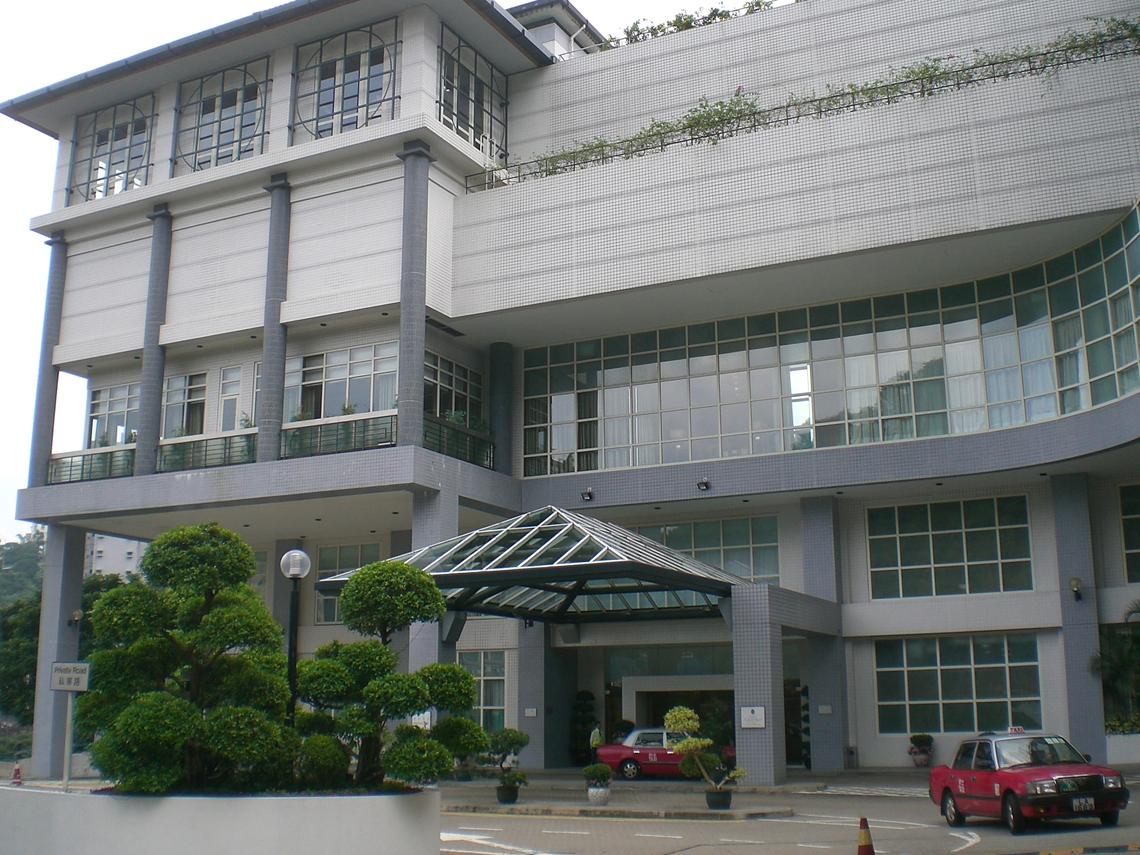 香港賽馬會跑馬地會所位於zh:跑馬地山光道